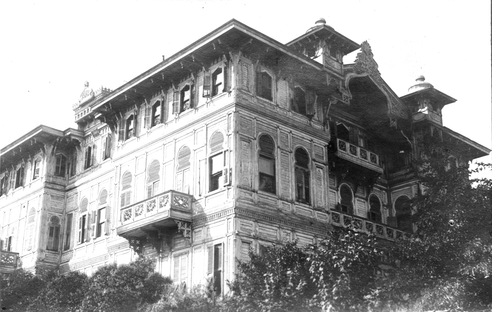 Léon Gurekian - Palazzo del Gran Vizir Halil Rifat Pacha - Costantinopoli